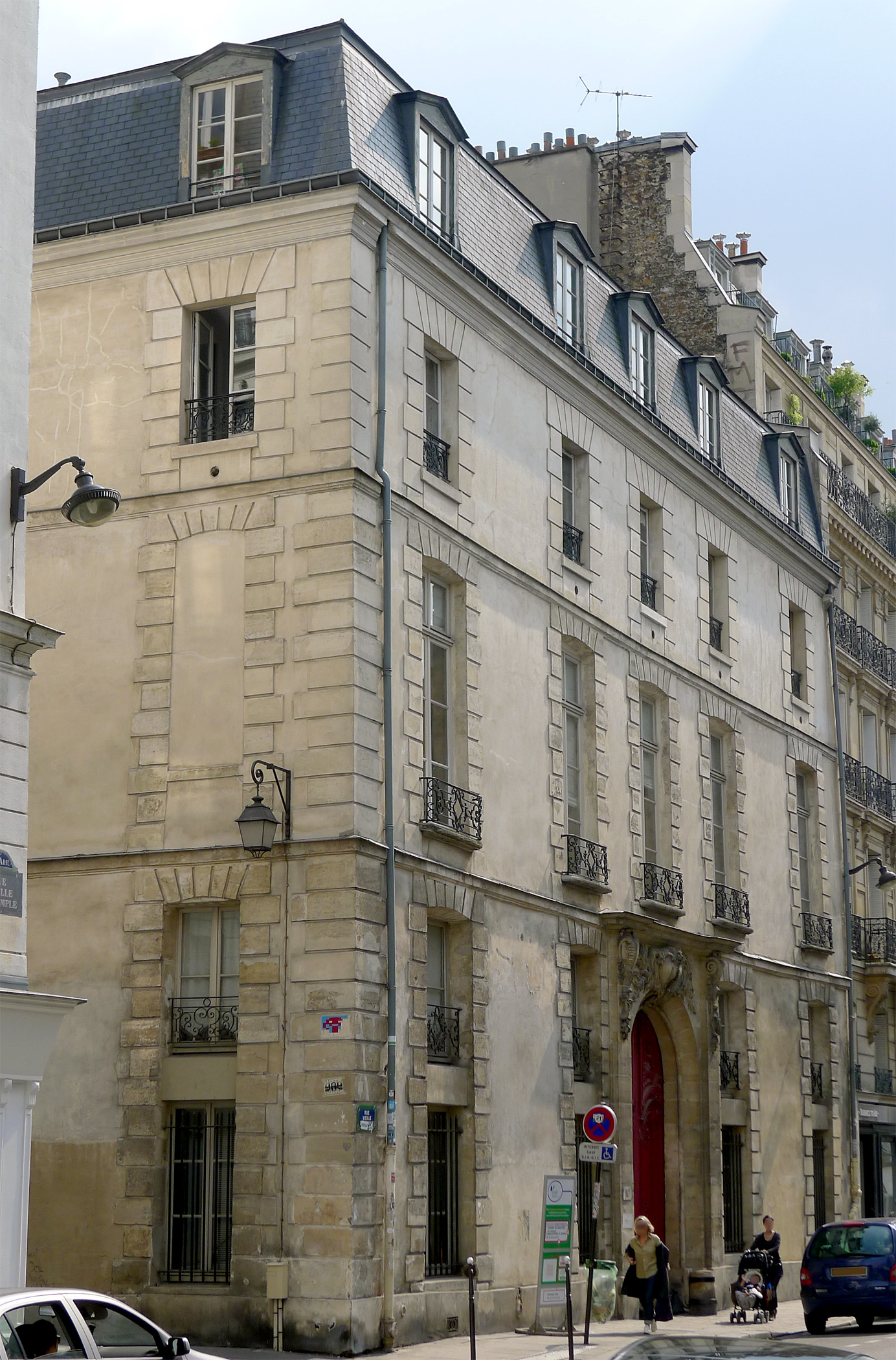 Hôtel d'Hozier, 110 rue Vieille-du-Temple9 rue Debelleyme (Inscrit, 1987) .